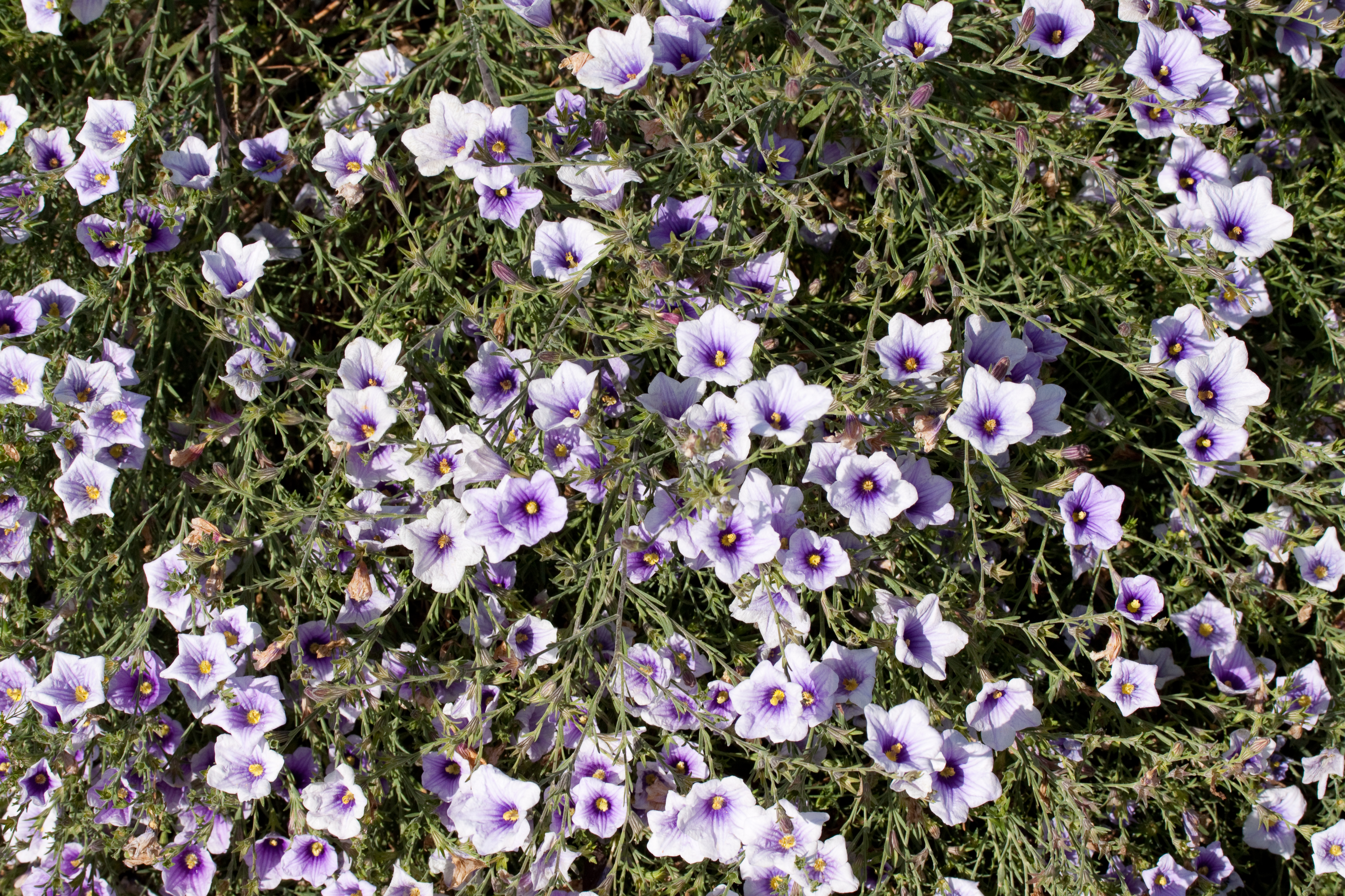 Floraison de Nierembergia scoparia - Jardin des Plantes - Paris - France